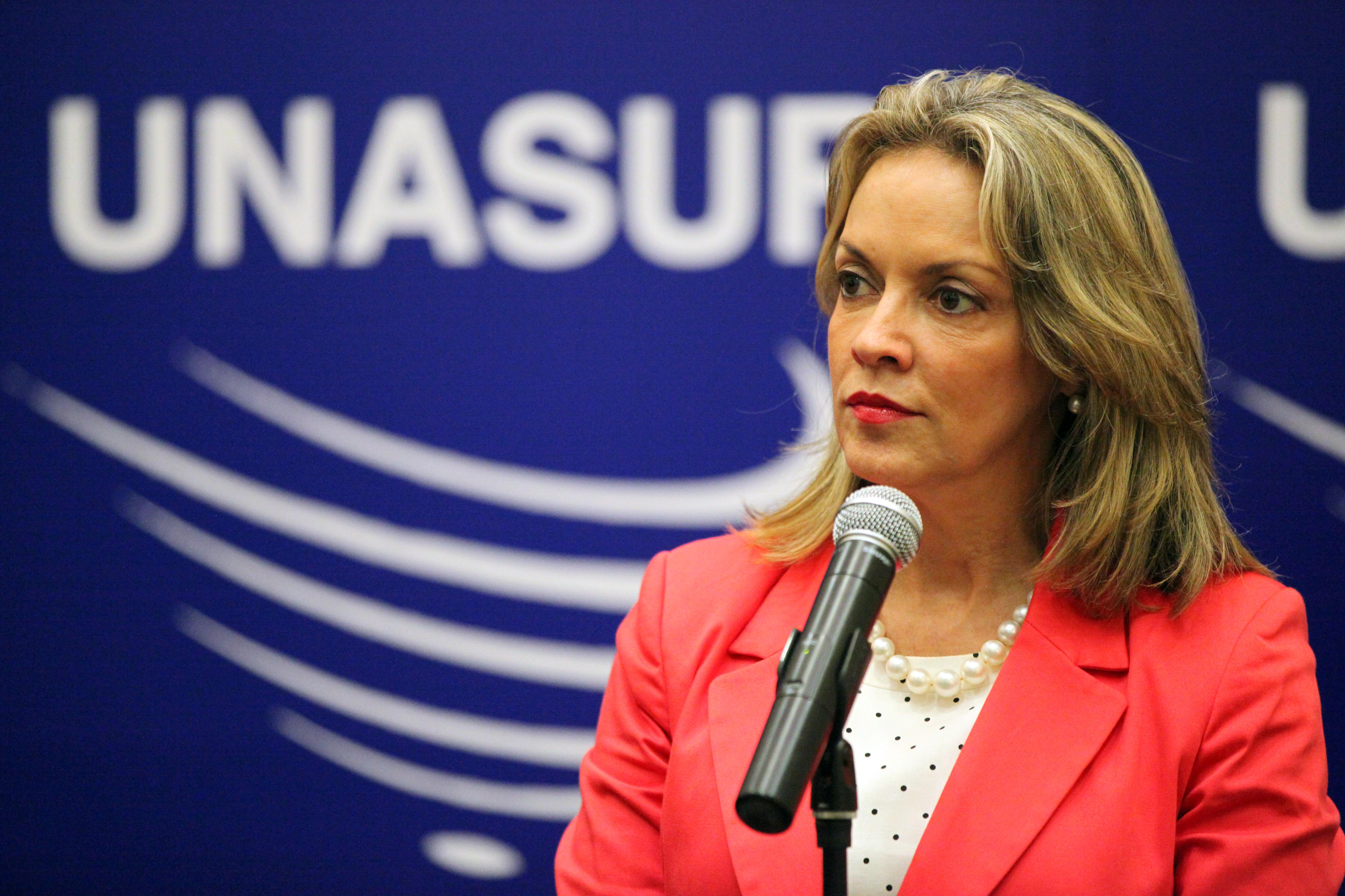 Colombia (Cartagena de Indias), 03 de mayo del 2012. Rueda de prensa por parte de la Secretaria General de UNASUR María Emma Mejía. Foto: Xavier Granja Cedeño/Ministerio de Relaciones Exteriores, Comercio e Integración.